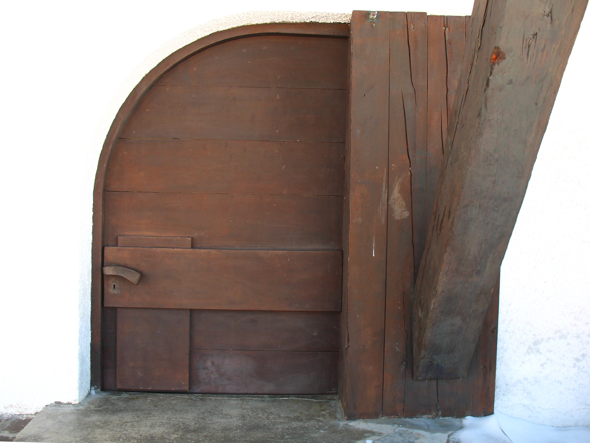 Bergkapelle des Architekten Franz Baumann auf Monte Pana - St. Christina in Gröden.